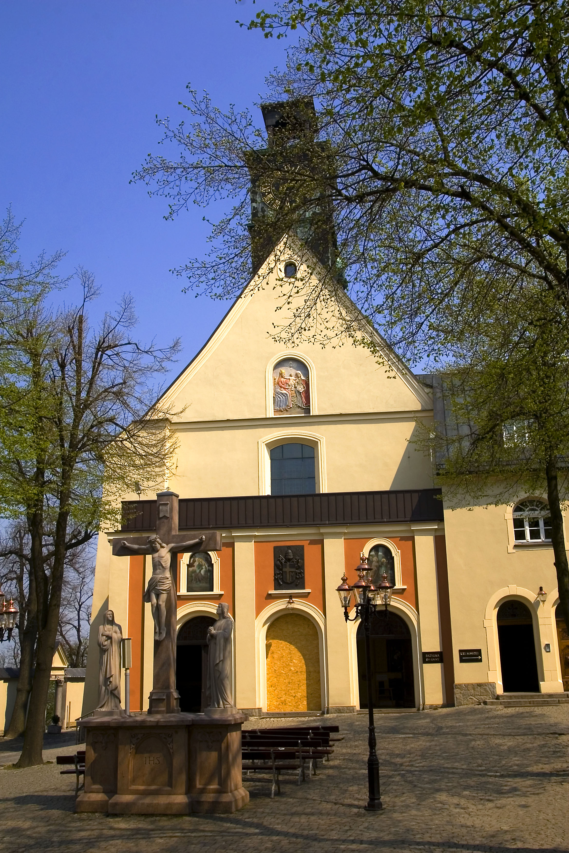 Góra św. Anny, kościół klasztorny franciszkanów. Gmina Leśnica, powiat strzelecki